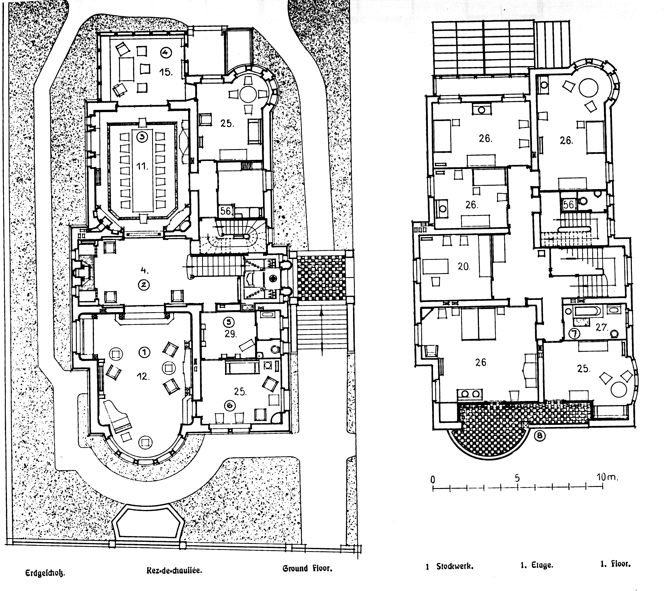 Villa Bestgen in Köln, Grundrisse